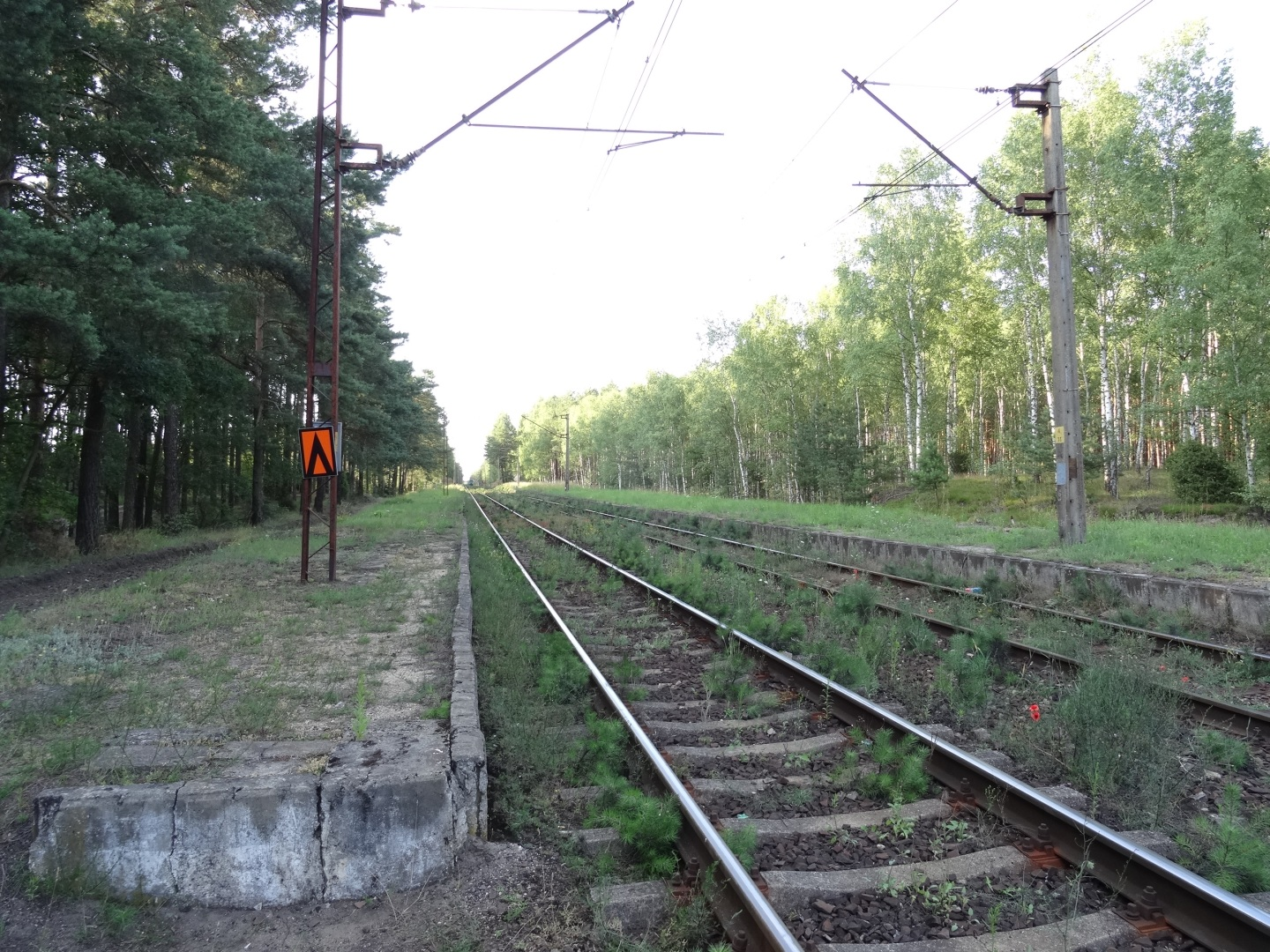 Prądocin - kolejowy przystanek osobowy, gmina Nowa Wieś Wielka, powiat bydgoski